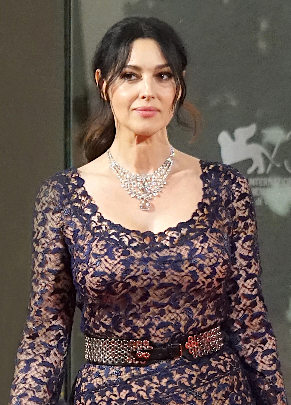 Arrivée de Monica Bellucci avec Emir Kusturica à la Mostra del Cinema au Lido de Venise pour la projection du film "On the milky road"